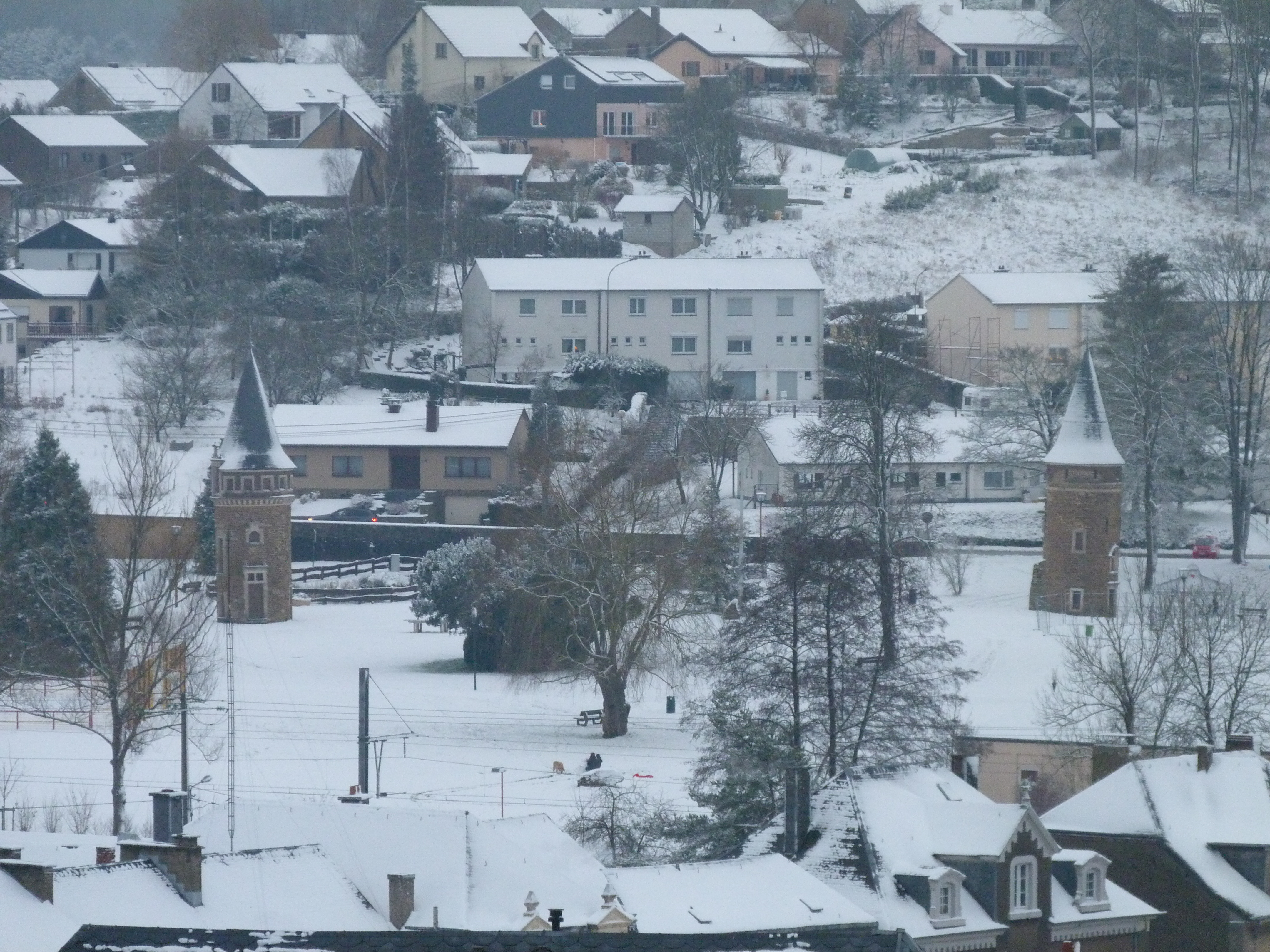 Ce qu'il reste de l'ancien château de Messancy, détruit par un incendie fin des années 1970